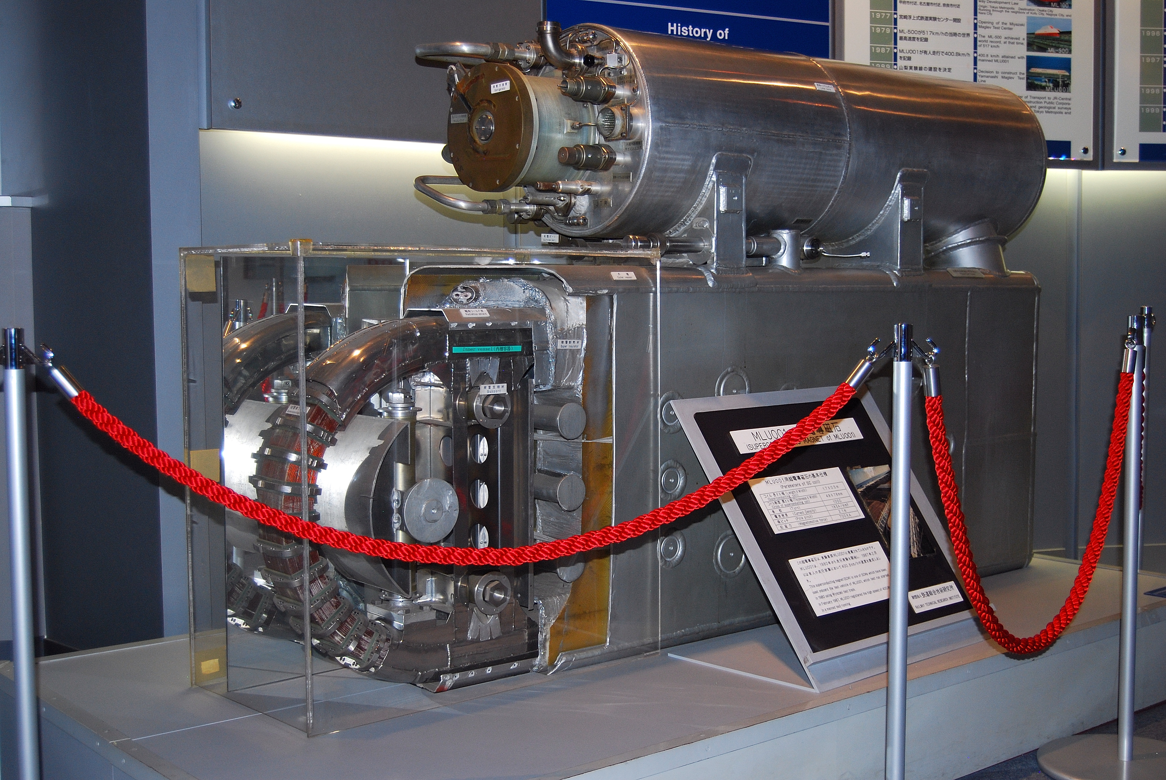 MLU 001の超伝導磁石、上部に超伝導状態を作り出す-268.95℃（4.21K）の液体ヘリウムタンクが設置されている。